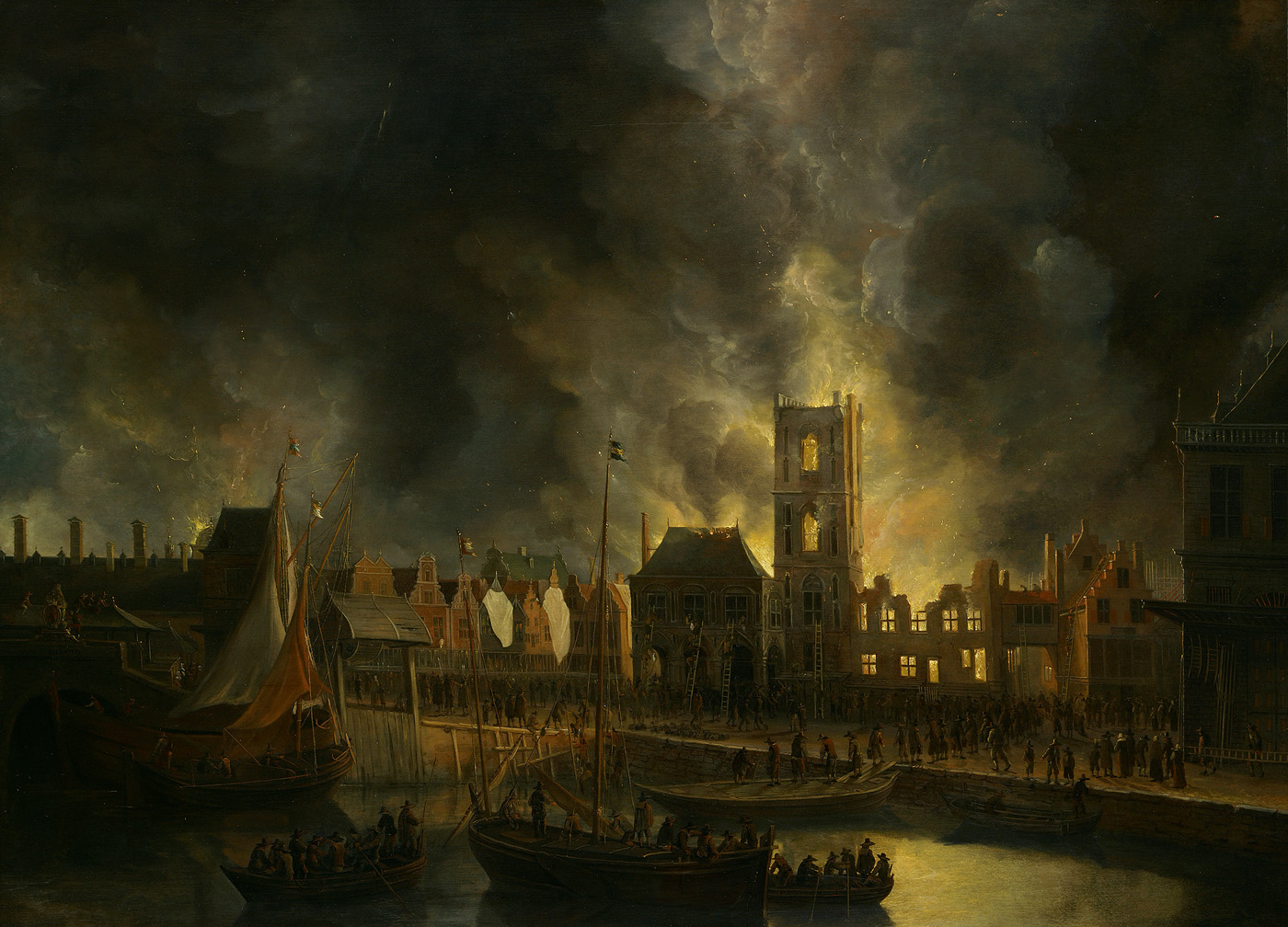 schilderij; geschiedenis (iconografie); stadsgezicht Amsterdam; brand van het oude stadhuis op de Dam; Stadhuis Amsterdam